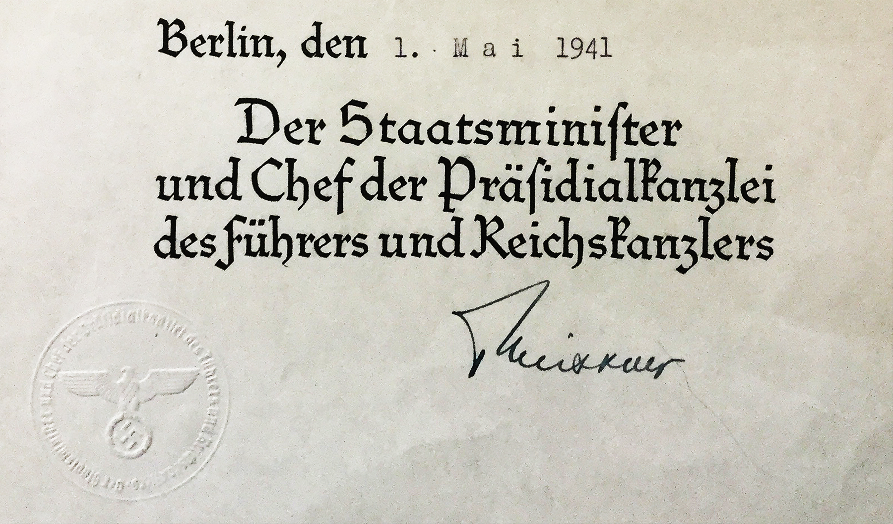 Unterschrift von Otto Meissner, Staatsminister und Chef der Reichskanzlei des Führers und Reichskanzlers auf einer Verleihungsurkunde zur "Erinnerungsmedaille für Rettung aus Gefahr"